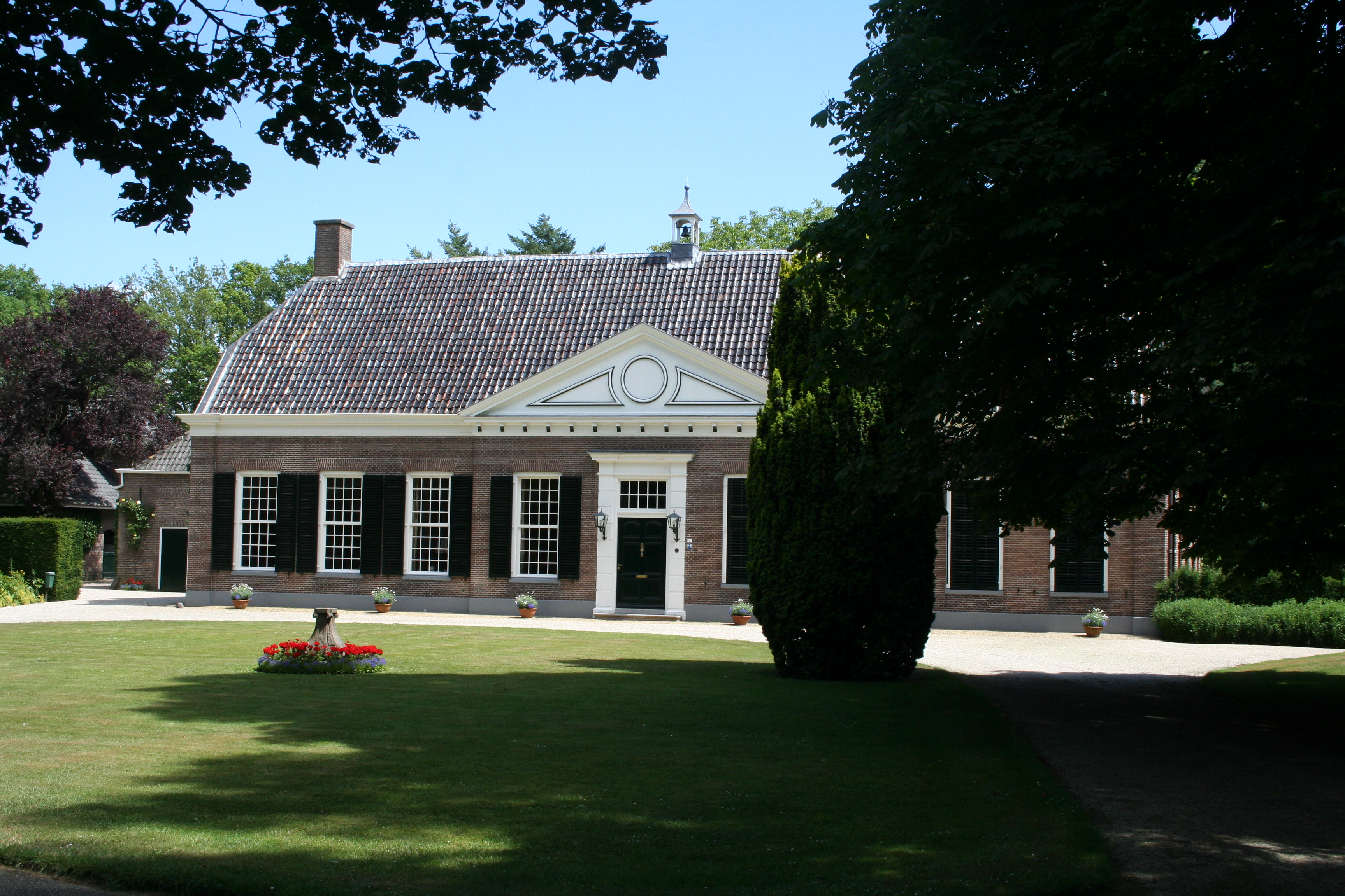 Huize Leemcule te Dalfsen